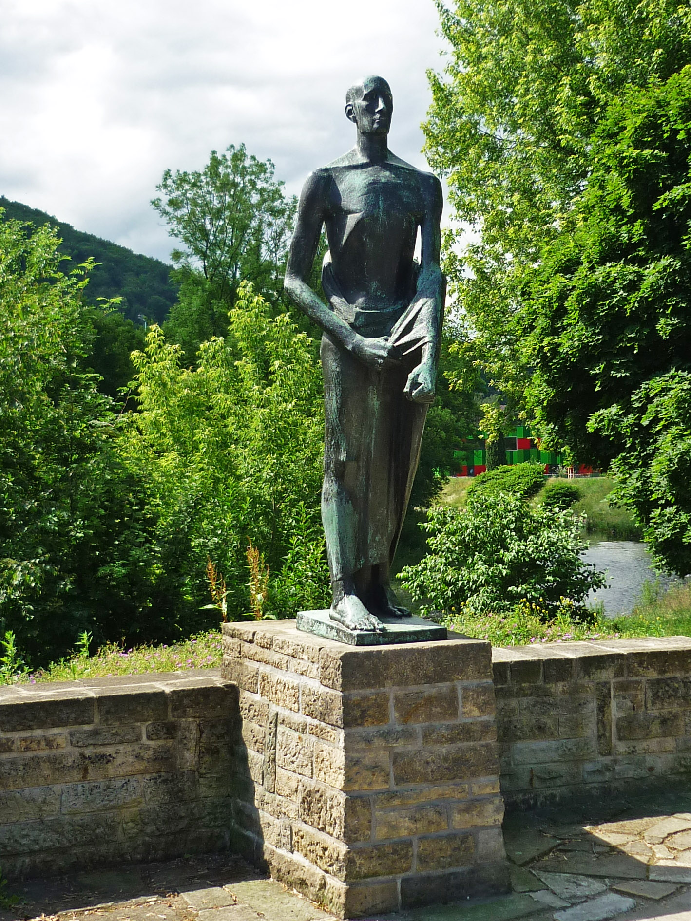 OdF-Denkmal in der Albert-Schweitzer-Str. in Freital-Döhlen mit Plastik von Wieland Förster